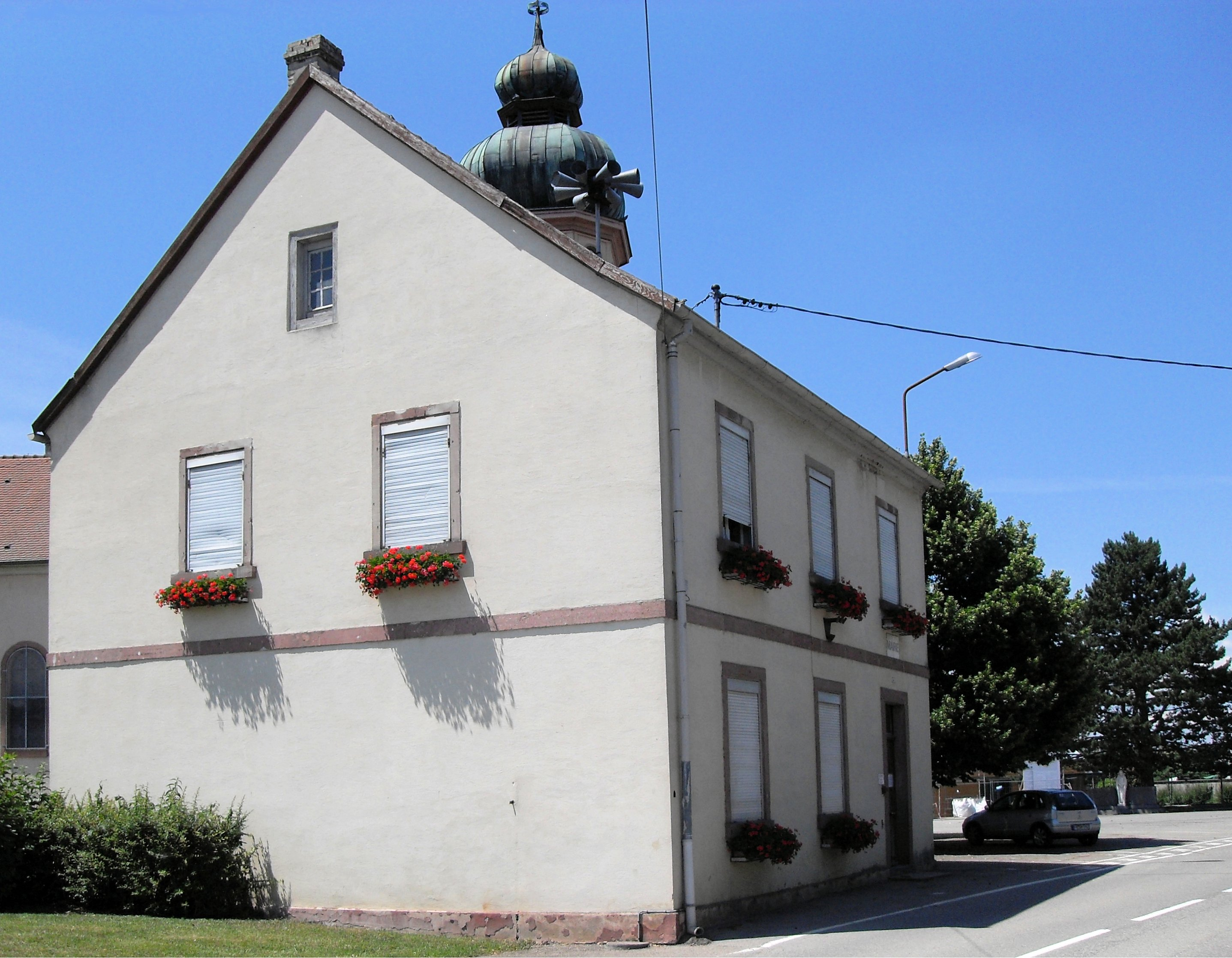 La mairie de Geiswasser